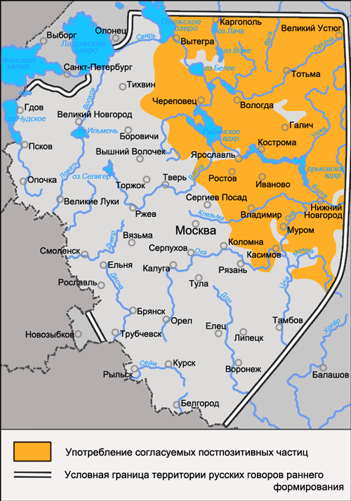 Карта распространения диалектного явления русского языка в области синтаксиса: употребление согласуемых постпозитивных частиц. Источник: Язык русской деревни. Диалектологический атлас. — Карта 25. Изменяемая частица -то в русских говорах.